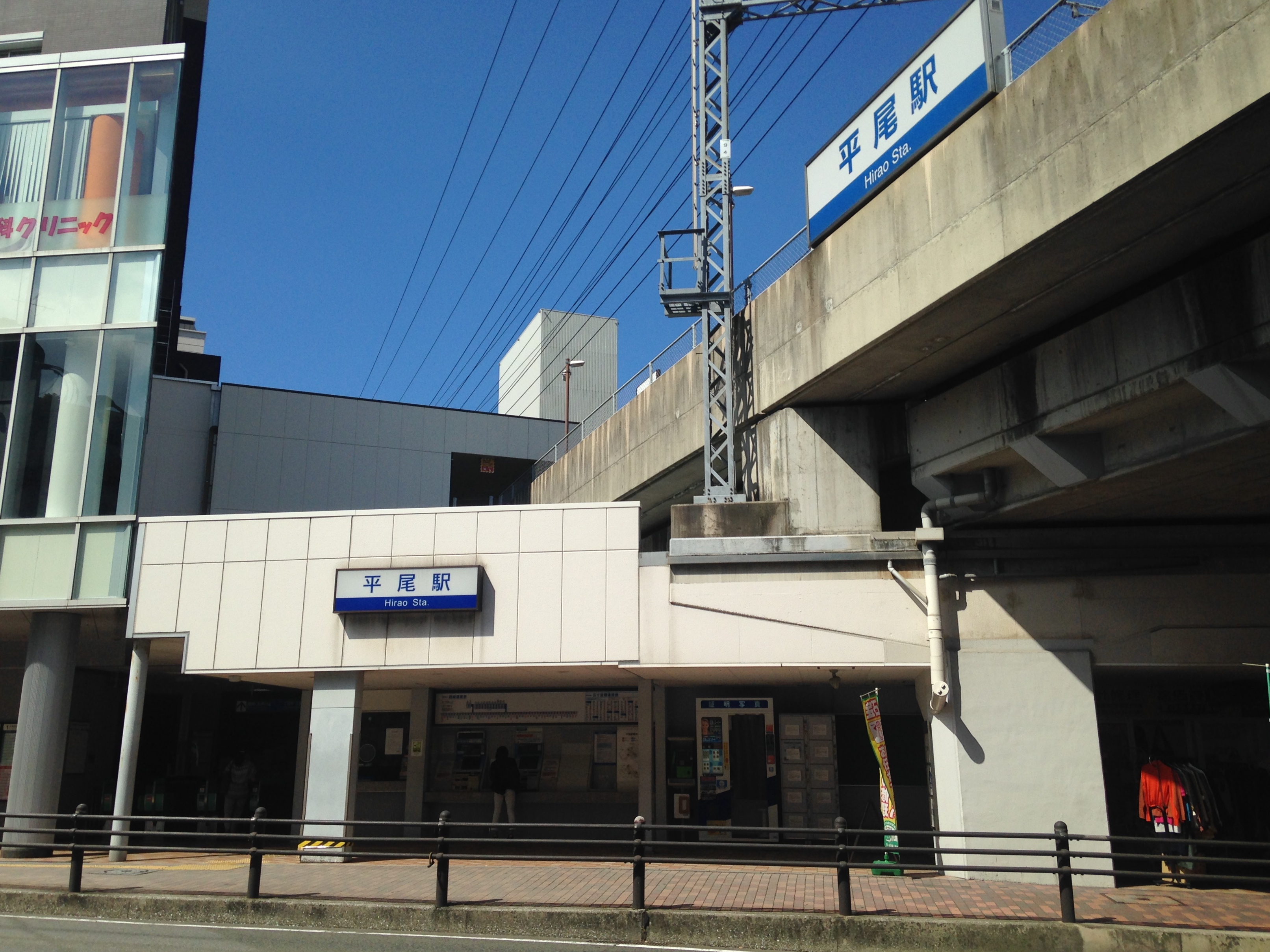 西鉄平尾駅駅舎